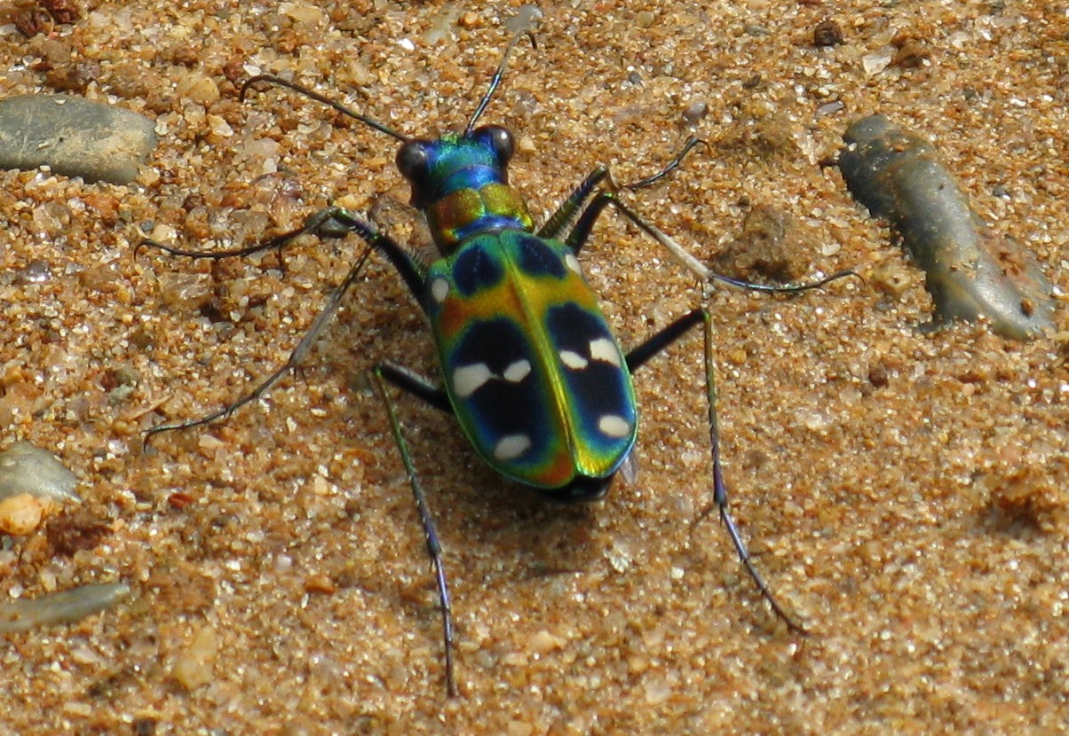 Scientific name Cicindela japonica